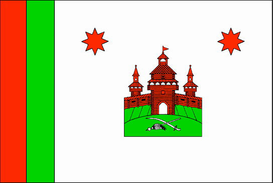 Прапор Тетіївського району